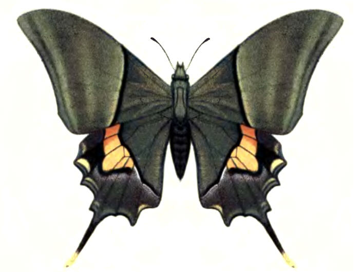 Teinopalpus imperialis Hope, 1843